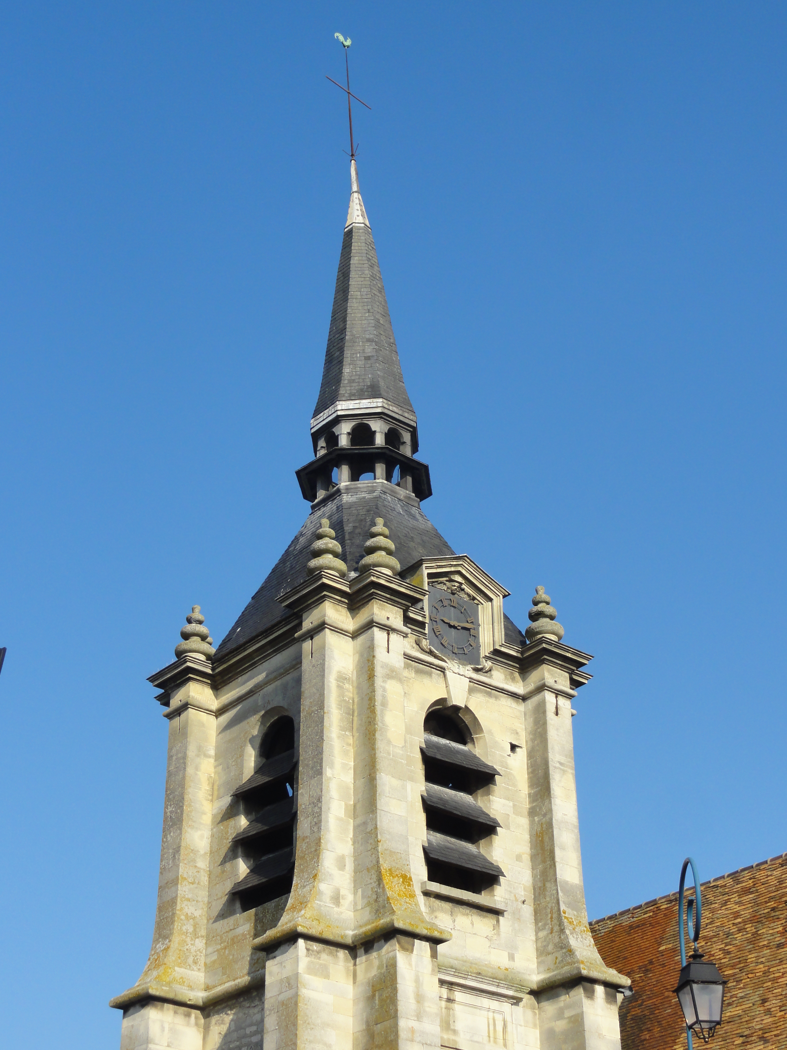 Voir titre.